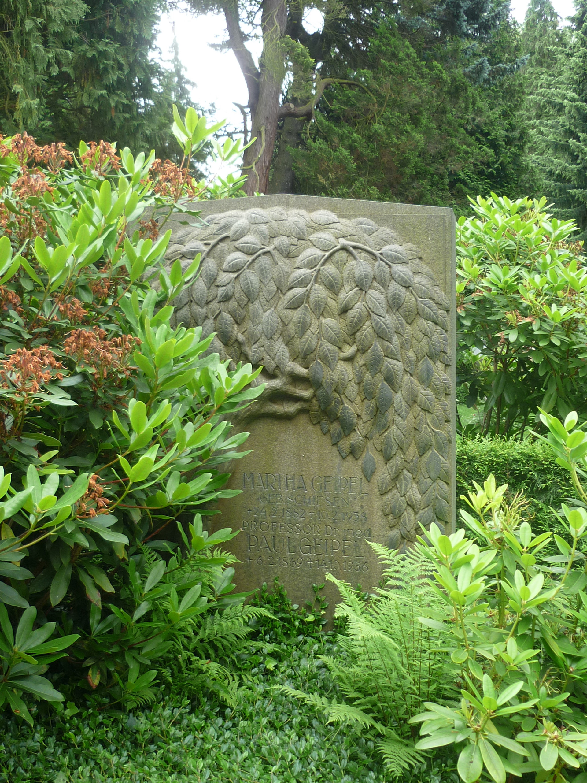 Loschwitzer Friedhof in Dresden-Loschwitz: Grabstätte Paul Geipel (1869–1956), Arzt und Mäzen